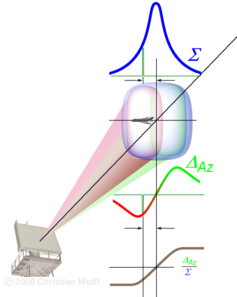 Principe du système monopulse